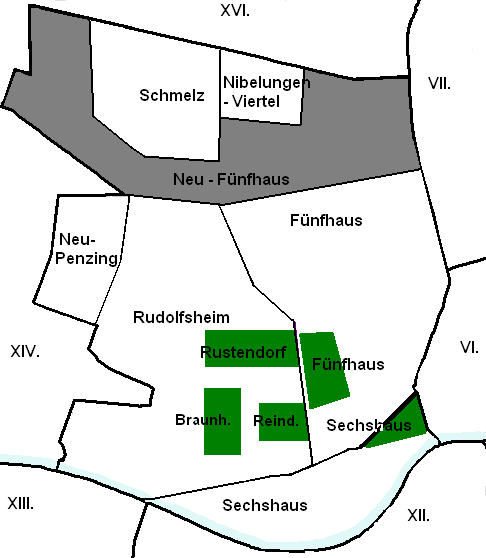 Karte von Neu-Fünfhaus